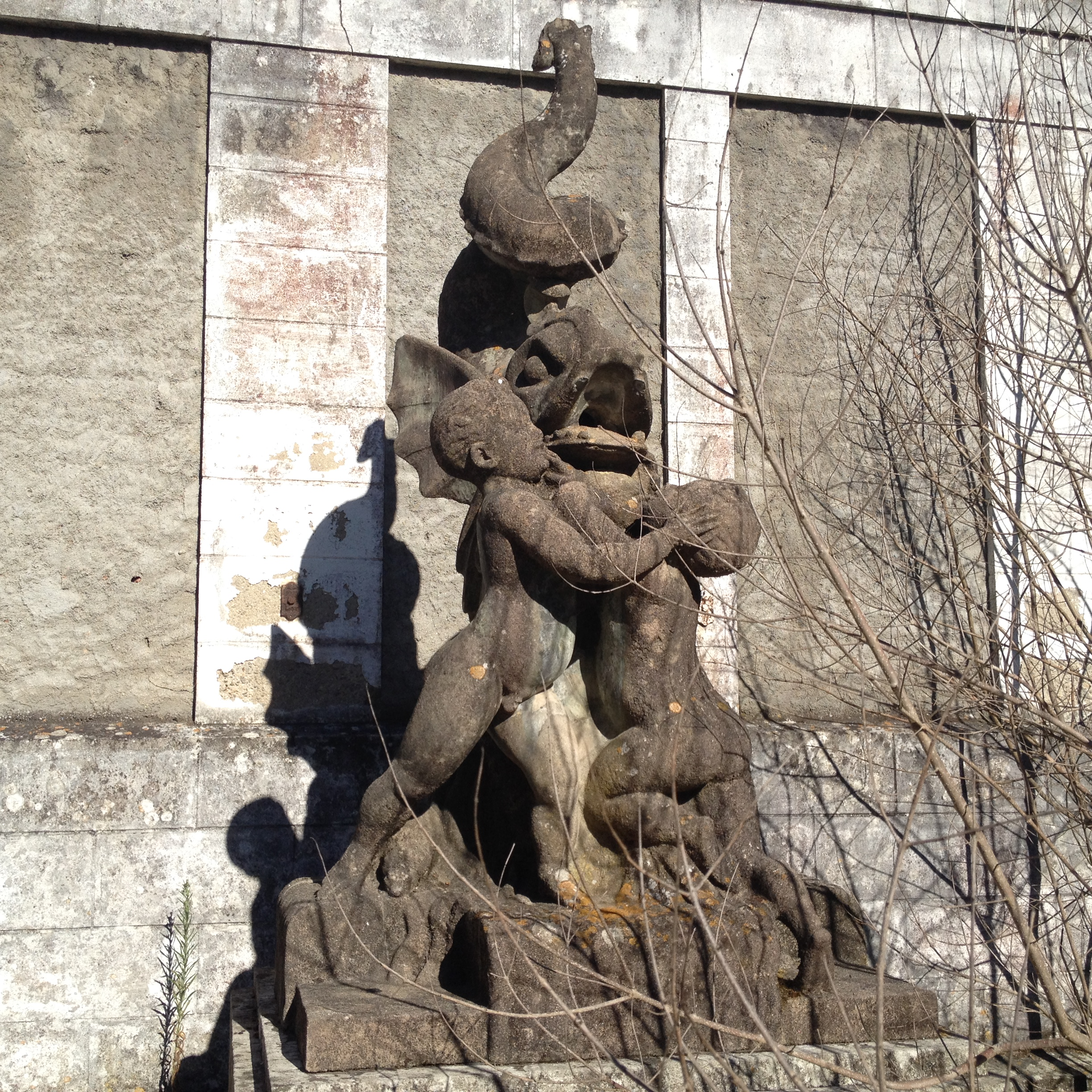 Escultura da fonte de Massó